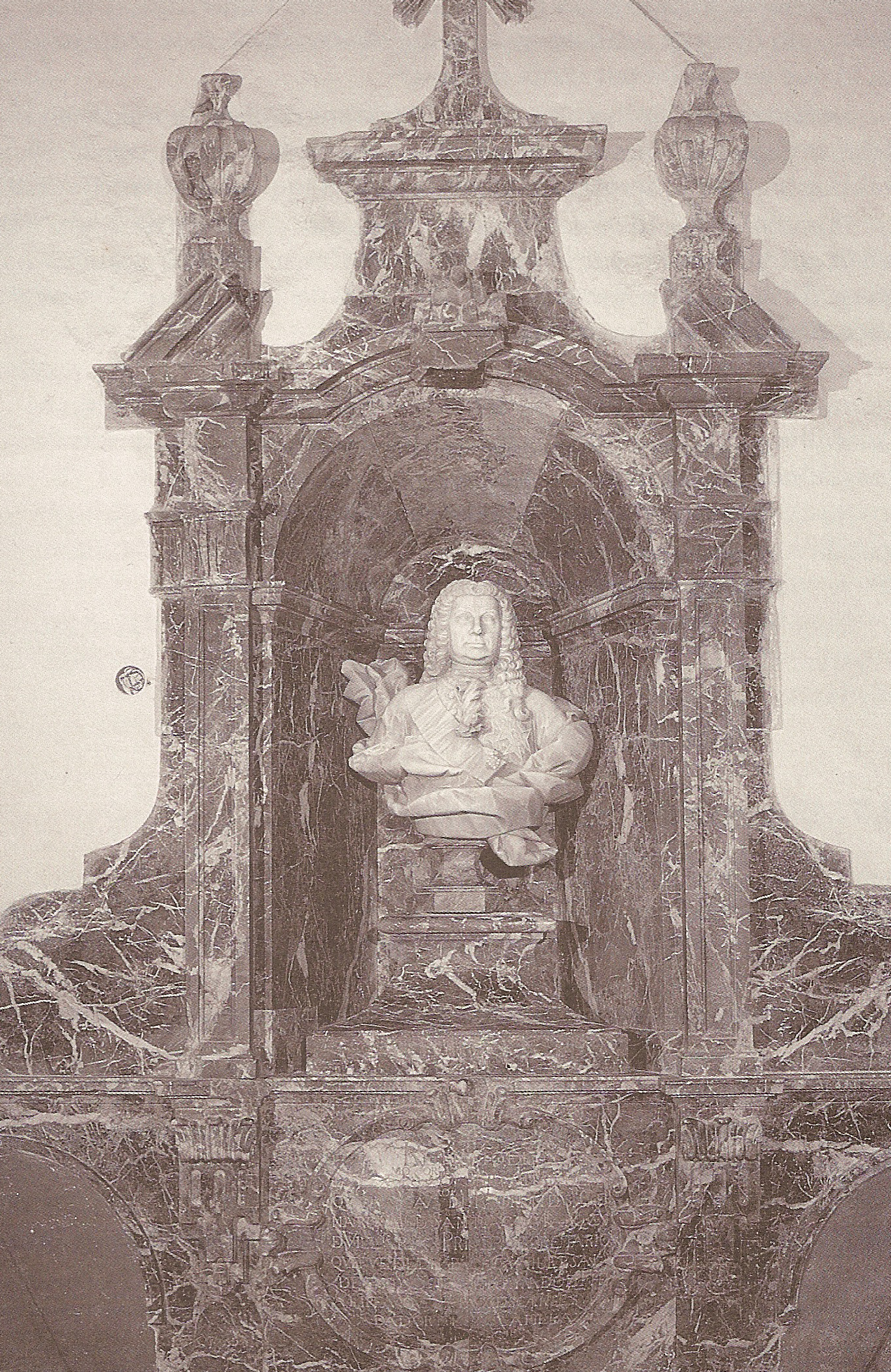 Nicho de marmol negro veteado y busto del primer Marqués de Villarías en la iglesia de San Juan Baustista(siglo XVIII)